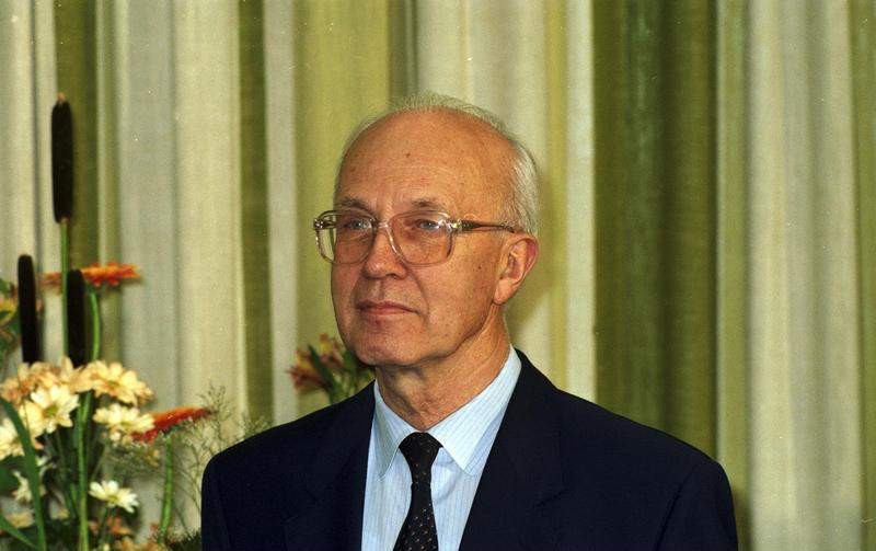 Bonn, 31.7.1991 Der Parlamentarische Staatssekretär beim Bundesminister der Finanzen, Manfred Carstens, gab anläßlich der Ernennung von Prof. Dr. Helmut Schlesinger zum Präsidenten der Deutschen Bundesbank und Dr. Hans Tietmeyer zum Vizepräsidenten der Deutschen Bundesbank einen Empfang im Bundesministerium der Finanzen.